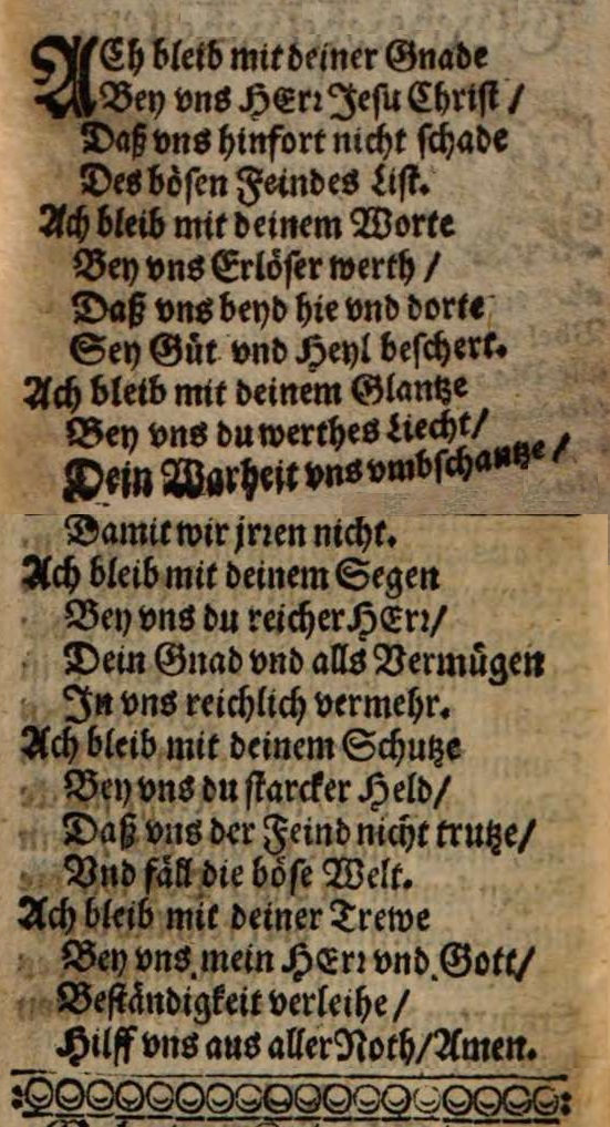 Josua Stegmann: Ach bleib mit deiner Gnade. In: Ernewerte Hertzen-Seufftzer, Lüneburg 1633, S. 347-348